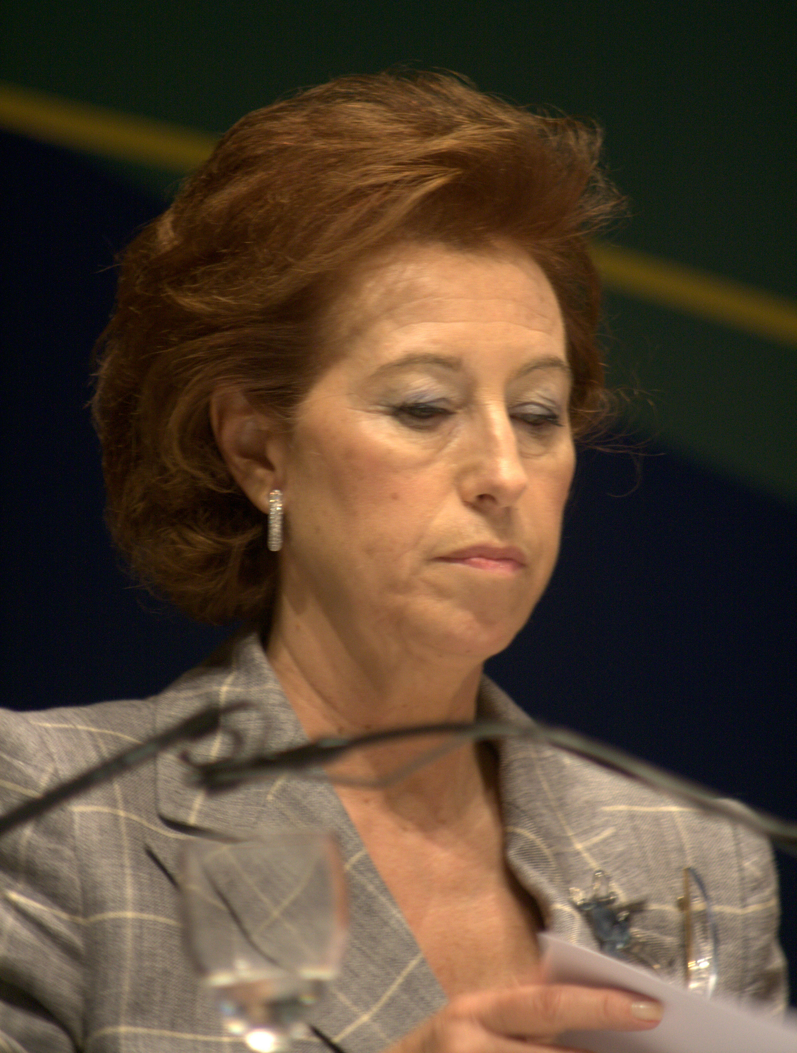 Letizia Moratti agli Stati Generali dell'Expo 2015.